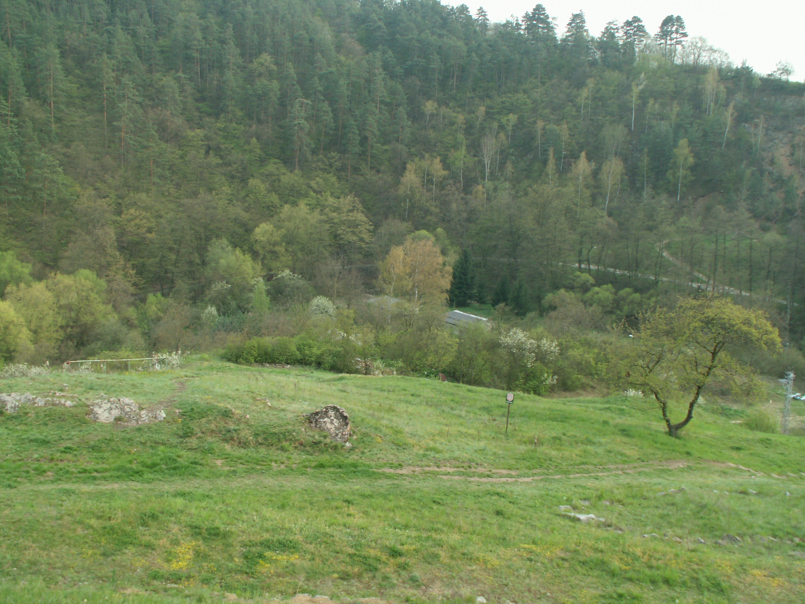 Pohled seshora na Obřanskou stráň.